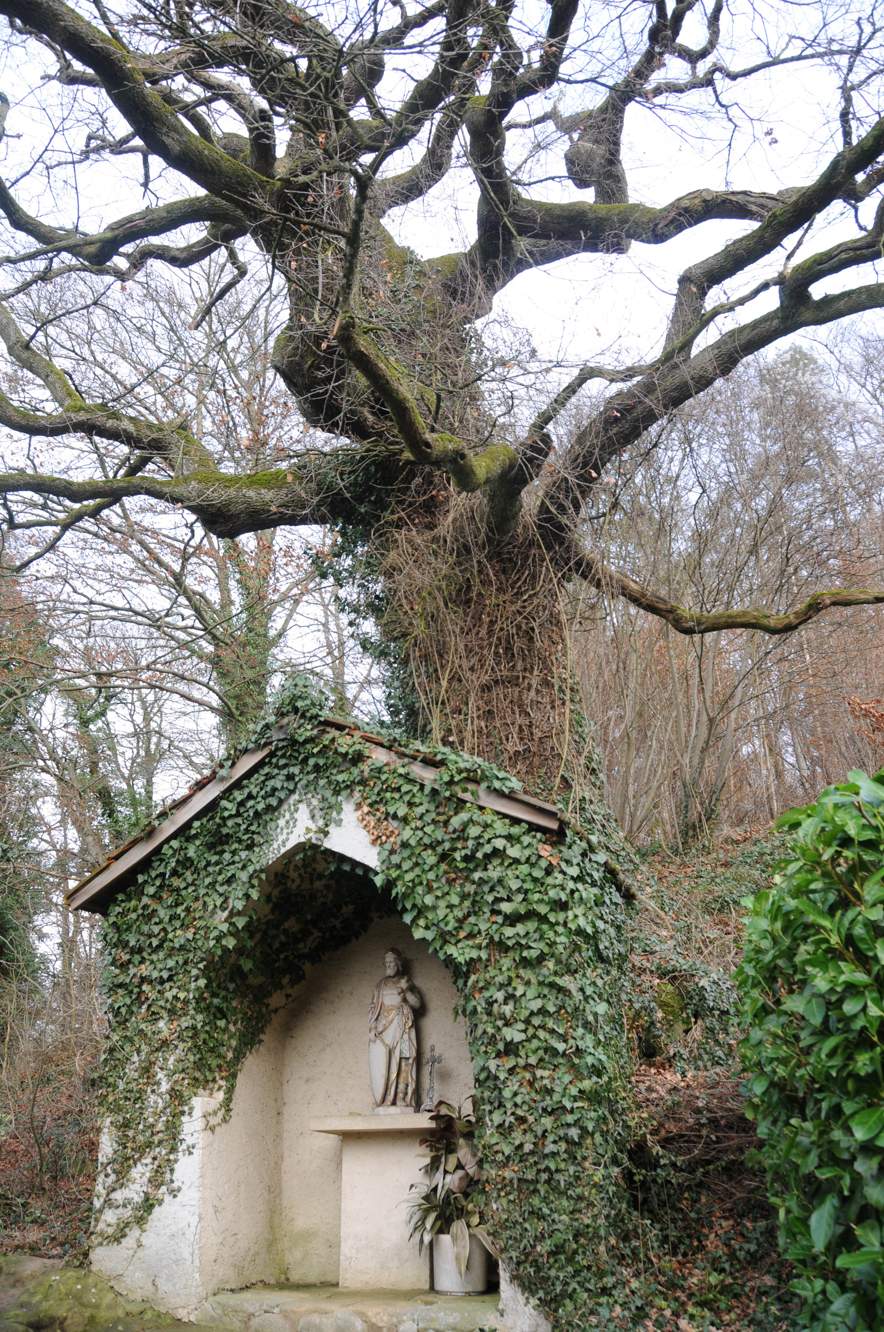 D'Donatius Kapell virun der Eech.